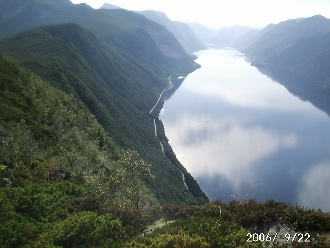 mini|Dalsfjorden sett frå Kornbergsfjellet